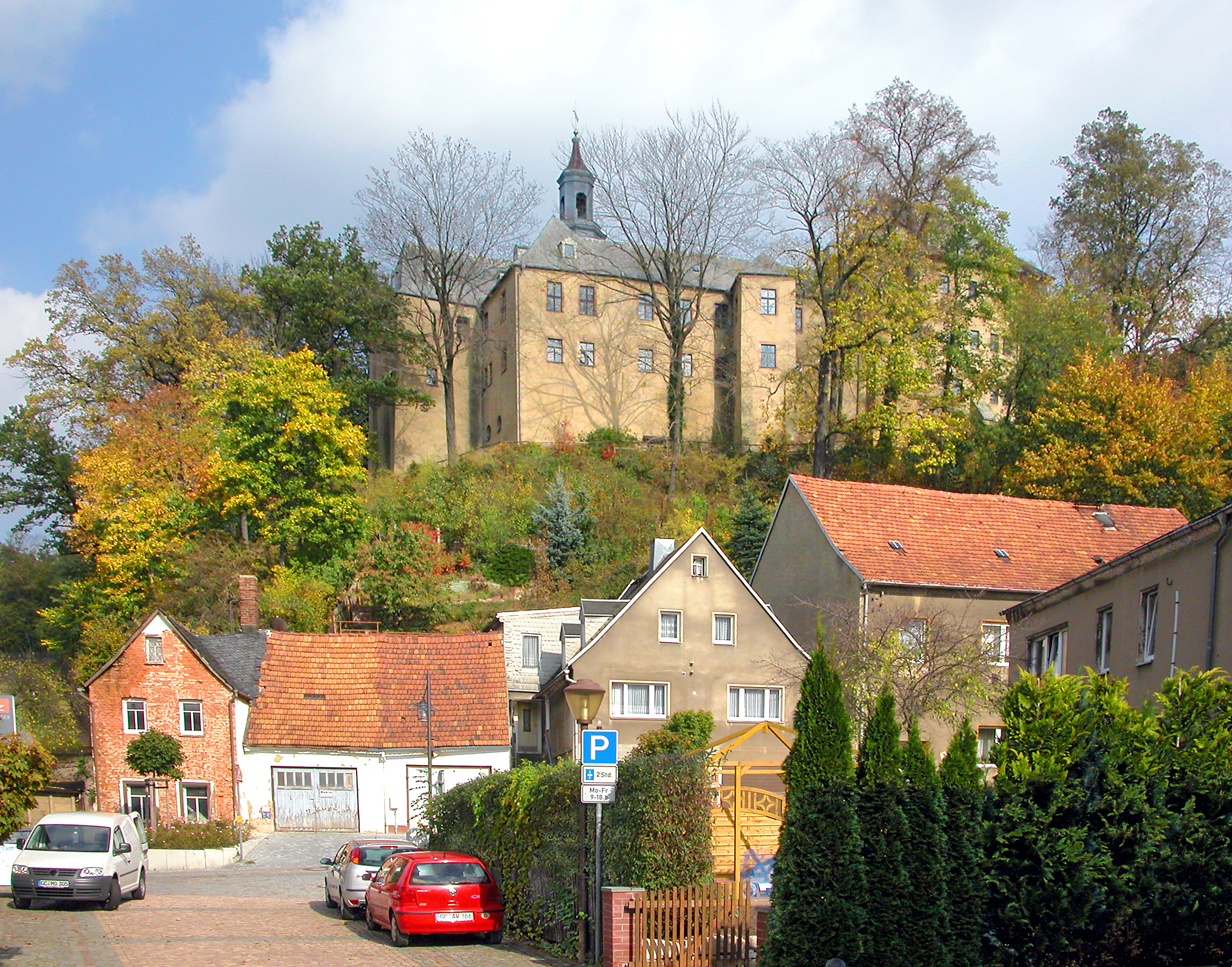 16.10.2007 09350 Lichtenstein Sachsen: Schloß vom Ort aus NW. Gegründet Ende 12. Jh. durch die Herren von Schönburg. 1945 Flüchtlingslager. Von 1949 bis 2000 Alten- und Pflegeheim der Caritas. Verkauf an Prinz Alexander von Schönburg-Hartenstein. Nicht öffentlich zugänglich. [DSCN30784.TIF]20071016500DR.JPG(c)Blobelt